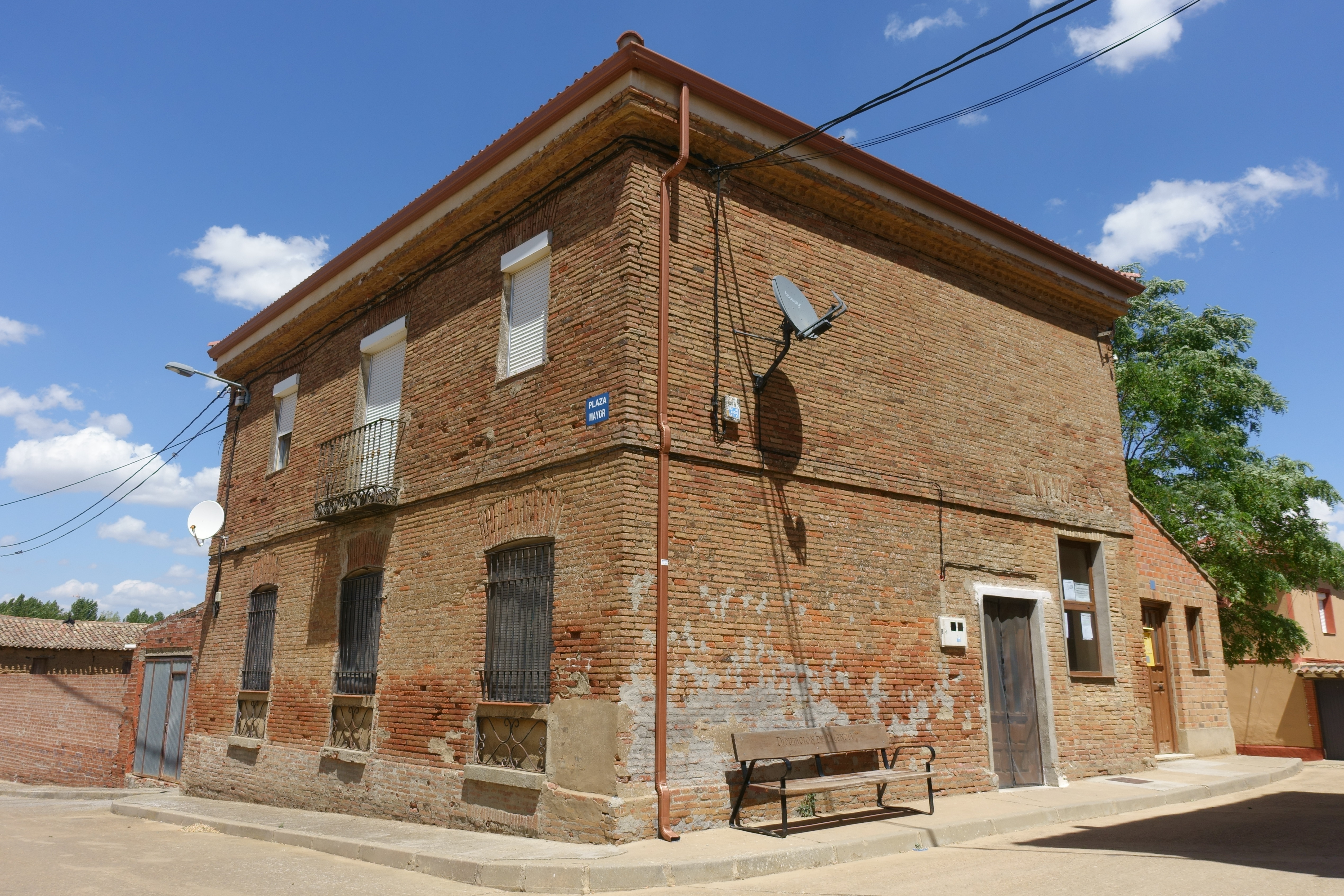 Casa consistorial de Cardeñosa de Volpejera (Palencia, España).